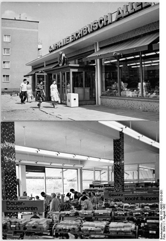 Berlin, Treptow, "Konsum"-Kaufhalle, Innenansicht, Aussenansicht Zentralbild Stöhr 1.8.1962 "Konsum-Kaufhalle Eichbuschallee" - Neueröffnet wurde kürzlich die "Konsum-Kaufhalle Eichbuschallee" im Stadtbezirk Berlin Treptow. Damit wurde für die dichtbesiedelten Stadtgebiete am Plänterwald eine vorbildliche Einkaufsmöglichkeit geschaffen. Neben einem Lebensmittel-Selbstbedienungsgeschäft (Bild unten) gehören Verkaufsgelände für Fleisch- und Wurstwaren, Backwaren, Obst und Gemüse zu der Kaufhalle.